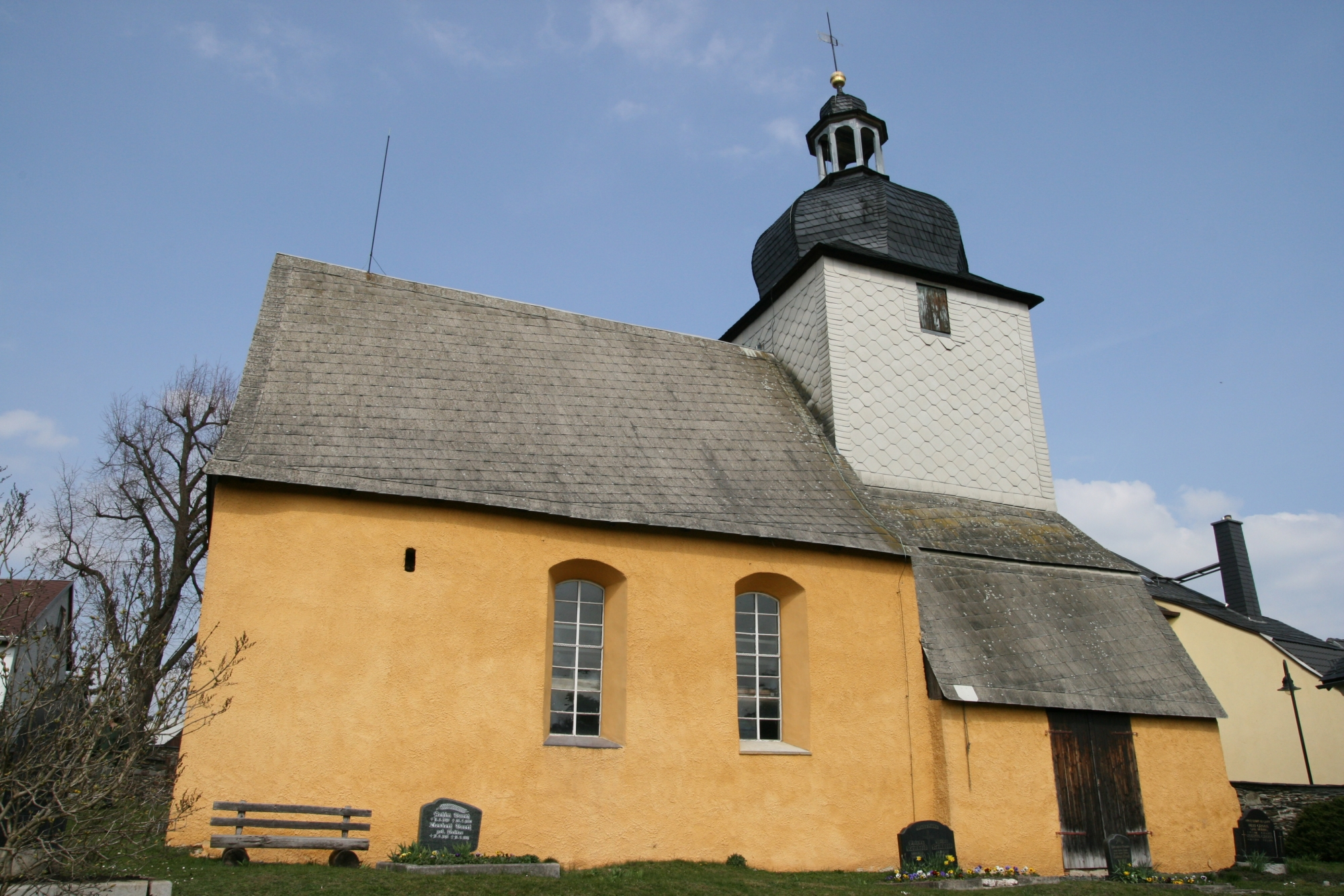 Kirche in Piesigitz, Thüringen, Deutschland